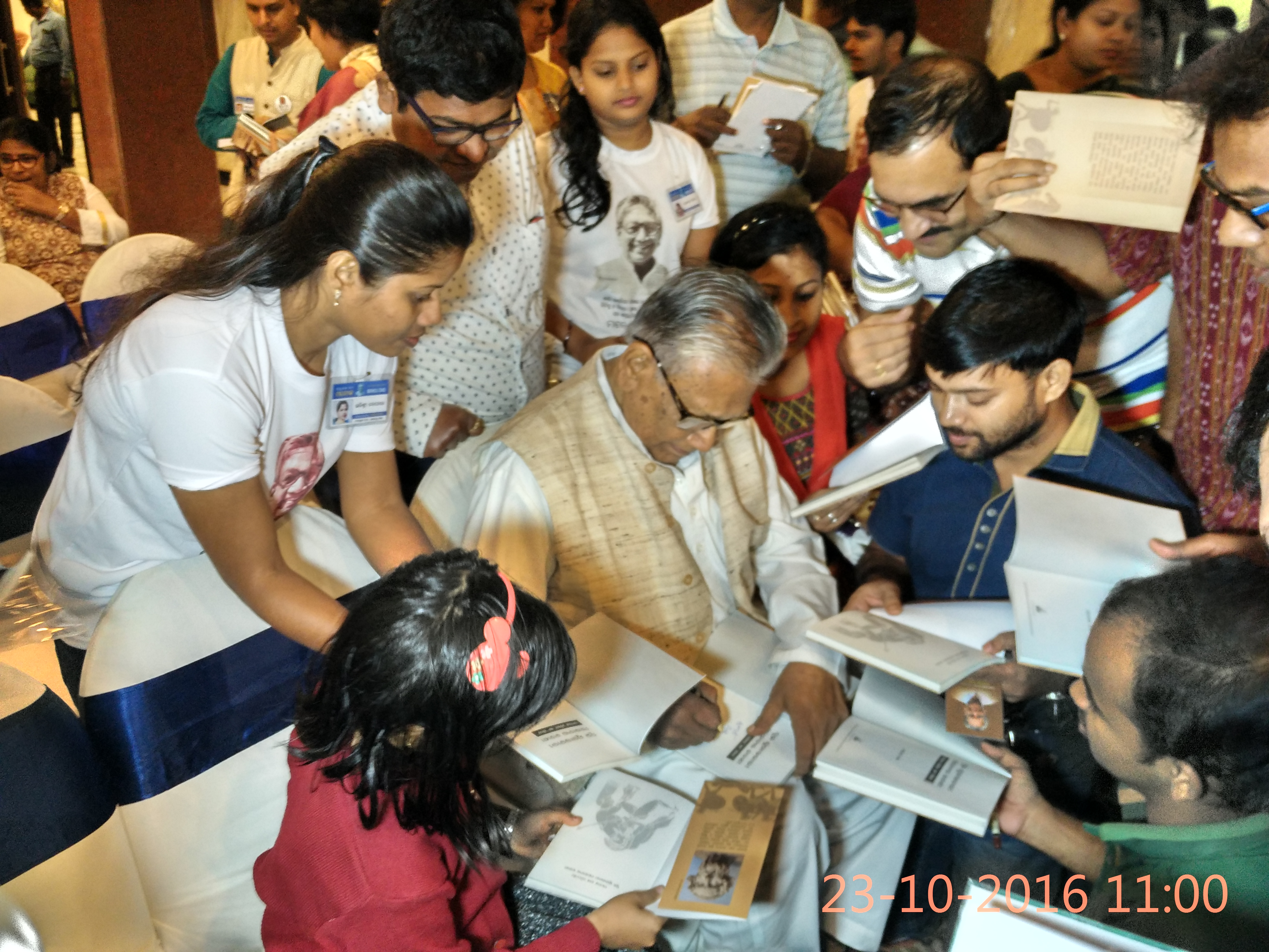 ଓଡ଼ିଆ: ଭୁବନେଶ୍ଵରଠାରେ,ନିଜ ପୁସ୍ତକ ଉନ୍ମୋଚନ ଉତ୍ସବରେ ମନୋଜ ଦାସ ପାଠକମାନଙ୍କୁ ଅଟୋଗ୍ରାଫ ଦେଉଛନ୍ତି